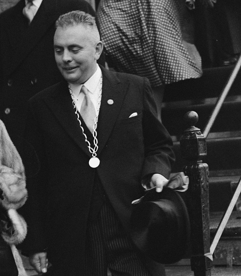 Collectie / Archief : Fotocollectie Anefo Reportage / Serie : [ onbekend ] Beschrijving : Serie: Bezoek van koningin Juliana en prins Bernhard aan Friesland. Koninklijk paar met burgemeester [locatie onbekend] Datum : 25 september 1950 Locatie : Friesland Trefwoorden : bezoeken, burgemeesters, koninklijk huis Persoonsnaam : Bernhard (prins Nederland), Juliana (koningin Nederland) Fotograaf : Noske, J.D. / Anefo, [onbekend] Auteursrechthebbende : Nationaal Archief Materiaalsoort : Glasnegatief Nummer archiefinventaris : bekijk toegang 2.24.01.09 Bestanddeelnummer : 904-2111